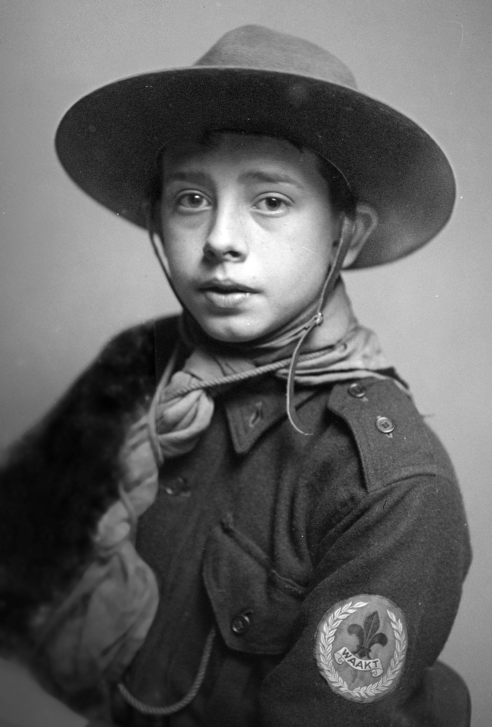 Beschrijving: Padvinder, Een van de zonen van fotograaf Jan Zeegers, waarschijnlijk Karel, in padvindersuniform. Documenttype: foto Vervaardiger: Jan Zeegers (fotograaf) Collectie: Collectie Jan Zeegers Datering: 1915 t/m 1920 Inventarissen: Afbeeldingsbestand: 010029000019